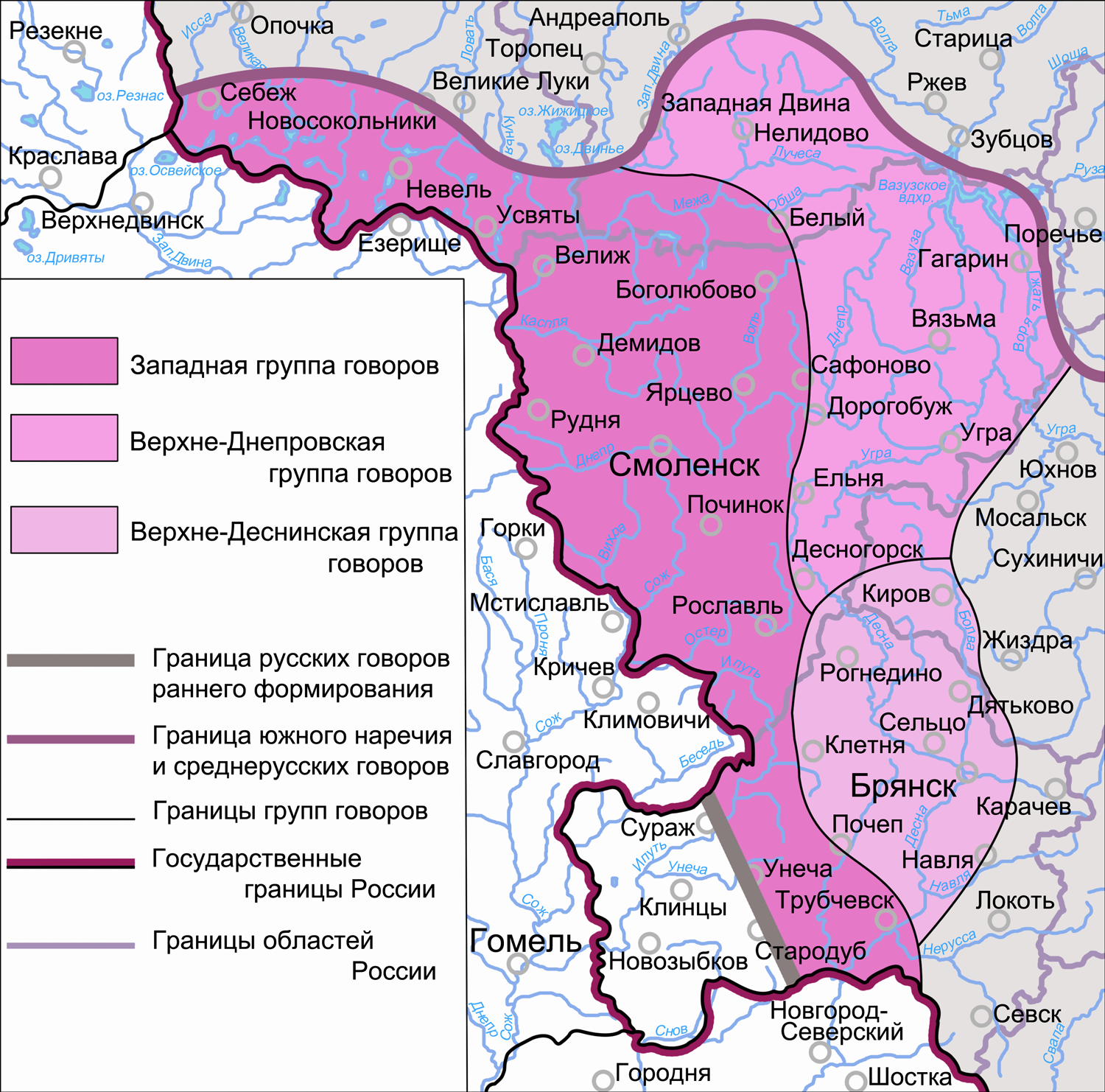 Карта западных южнорусских говоров (Западная группа, Верхне-Днепровская группа и Верхне-Деснинская группа) по диалектологической карте 1965 года. На основе данных: Захарова К. Ф., Орлова В. Г. Диалектное членение русского языка. М.: Наука, 1970. 2-е изд.: М.: Едиториал УРСС, 2004 Русские. Монография Института этнологии и антропологии Федеральная целевая программа Русский язык. Региональный центр НИТ ПетрГУ